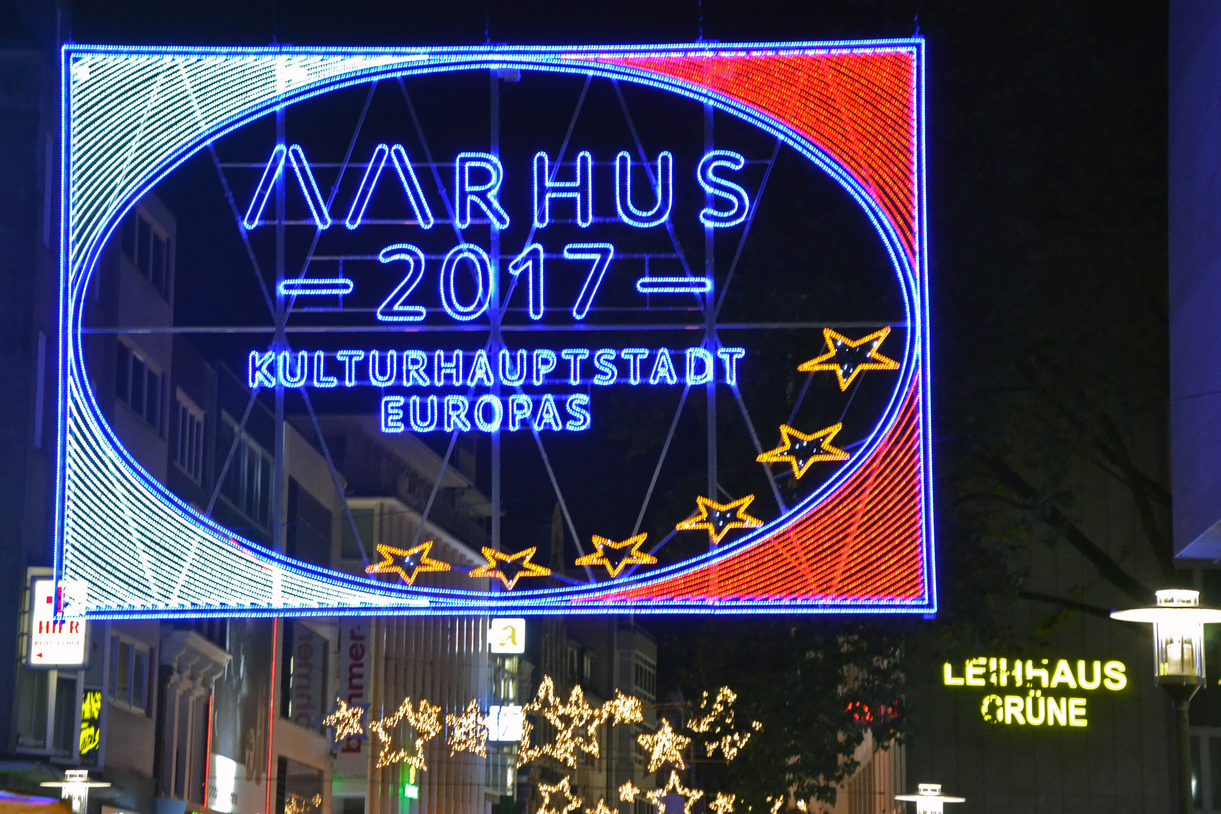 Essener Lichwochen 2016; Themenbild an der Kettwiger Straße: Aarhus - Kulturhauptstadt Europas 2017